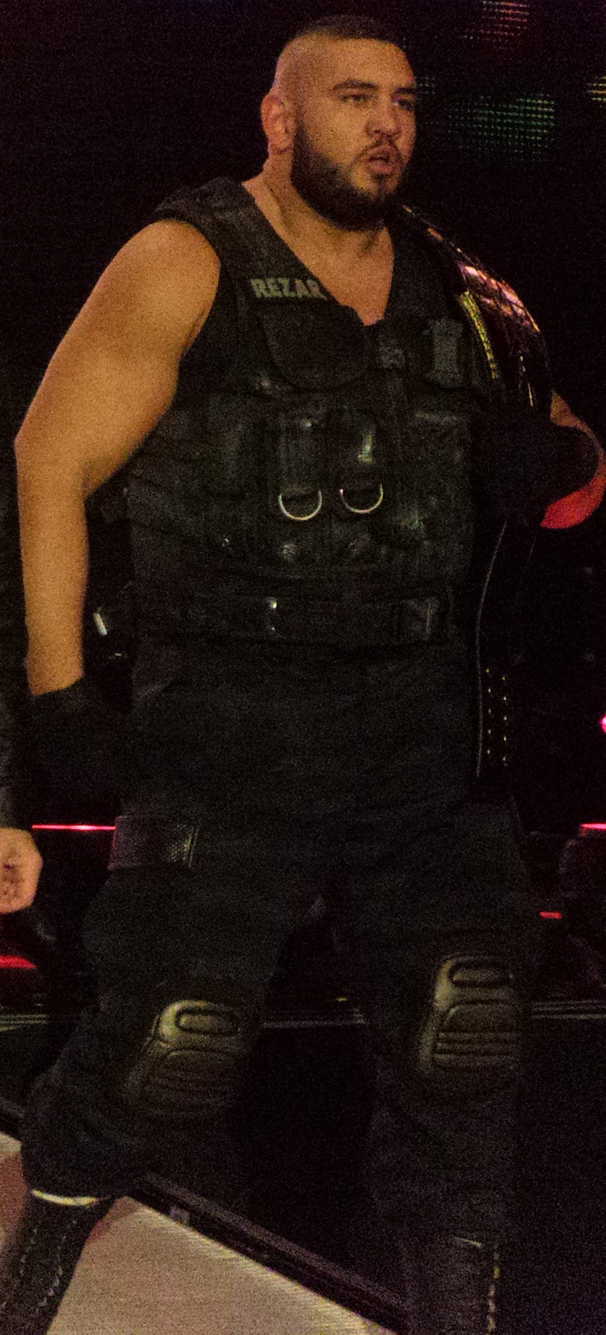 P_20170201_191226_002